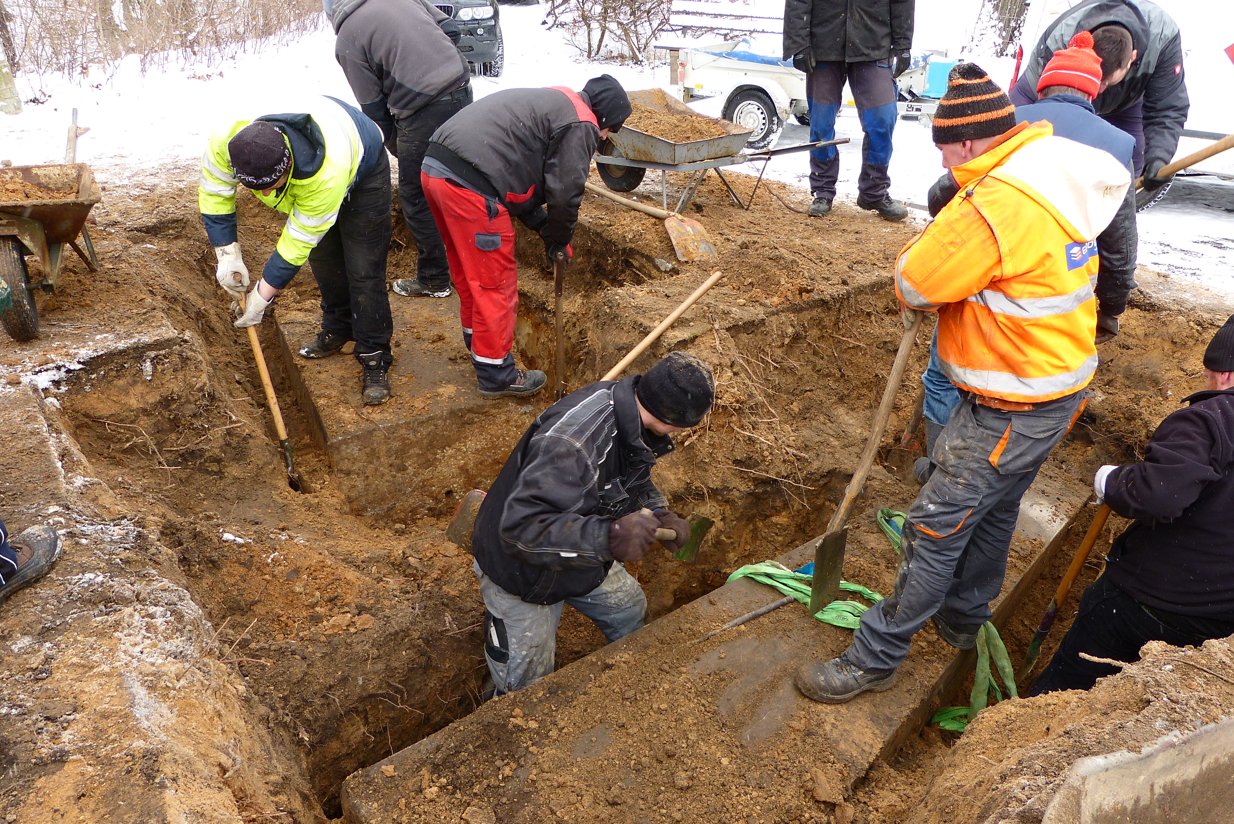 Fundlage der Pyramide und des Namenblicks vor der Bergung